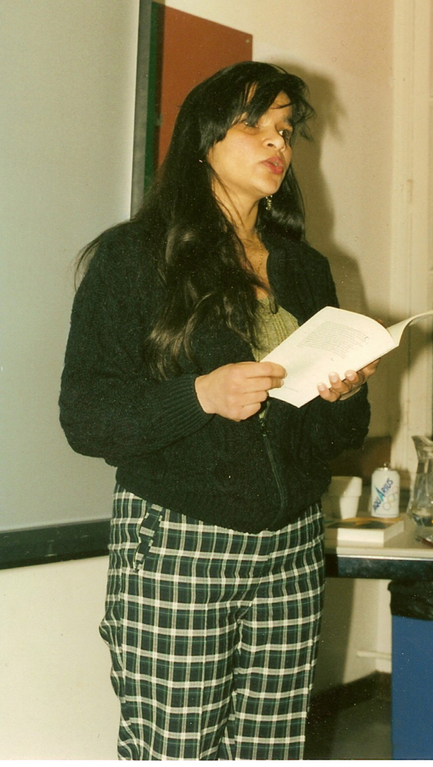 De Surinaamse dichter en schrijfster Cándani in 1992. Foto: Gerold Koningsbloem. Beschikbaar gesteld voor publiek domein.